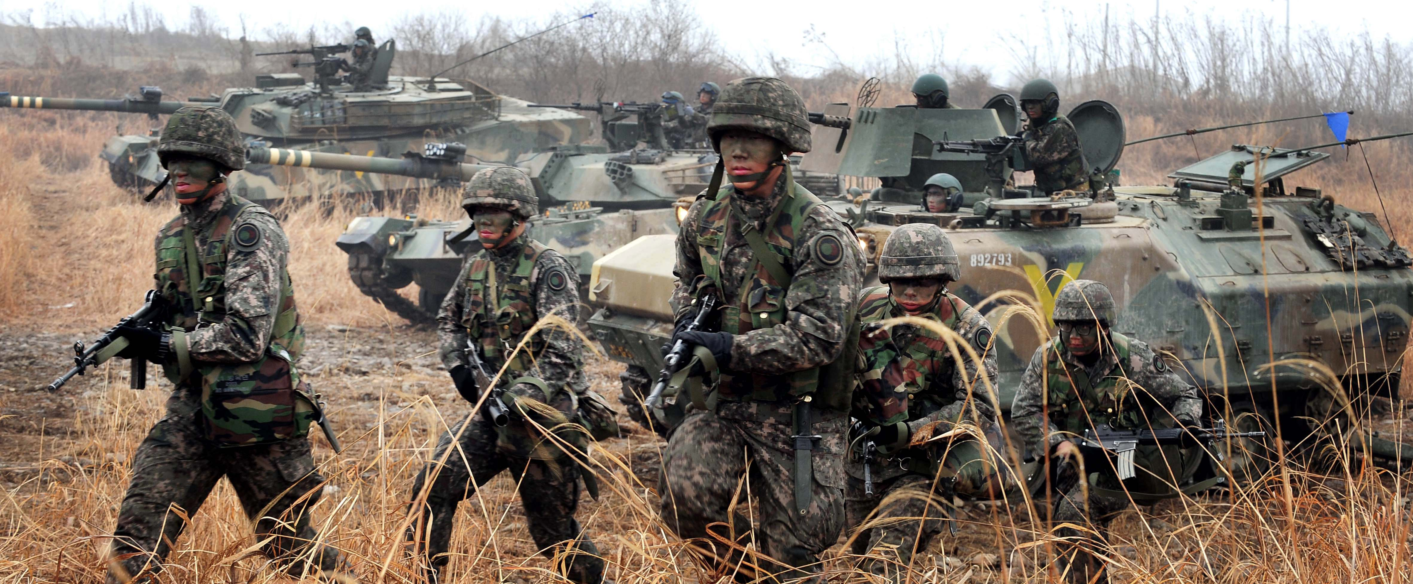 육군 26사단 기갑수색대대 장병들이 경기도 연천 일대에서 펼쳐진 혹한기 훈련의 일환으로 K-1 전차와 장갑차 엄호아래 하차 훈련을 하고 있다. 촬영 - 이헌구 기자